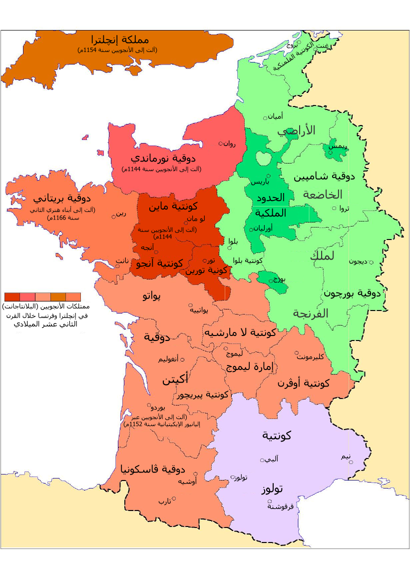 الأراضي الخاضعة للملوك الأنجويين في كلٍّ من إنجلترا وفرنسا خلال القرن الثاني عشر الميلادي.